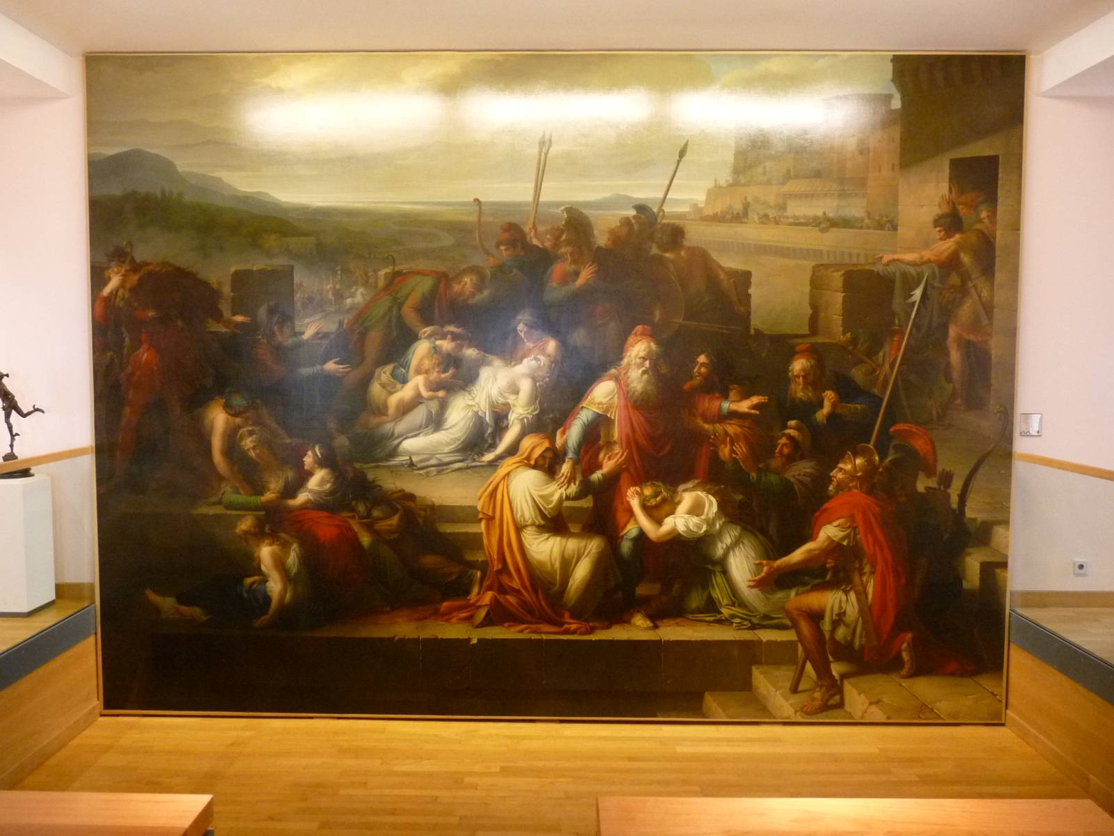 La consternation de la famille Priamtitle QS:P1476,fr:"La consternation de la famille Priam" label QS:Lfr,"La consternation de la famille Priam"